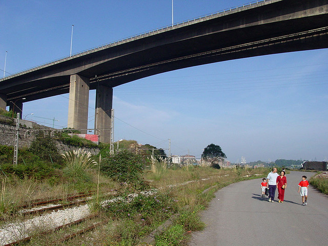 Barakaldo, Rontegiko zubipean